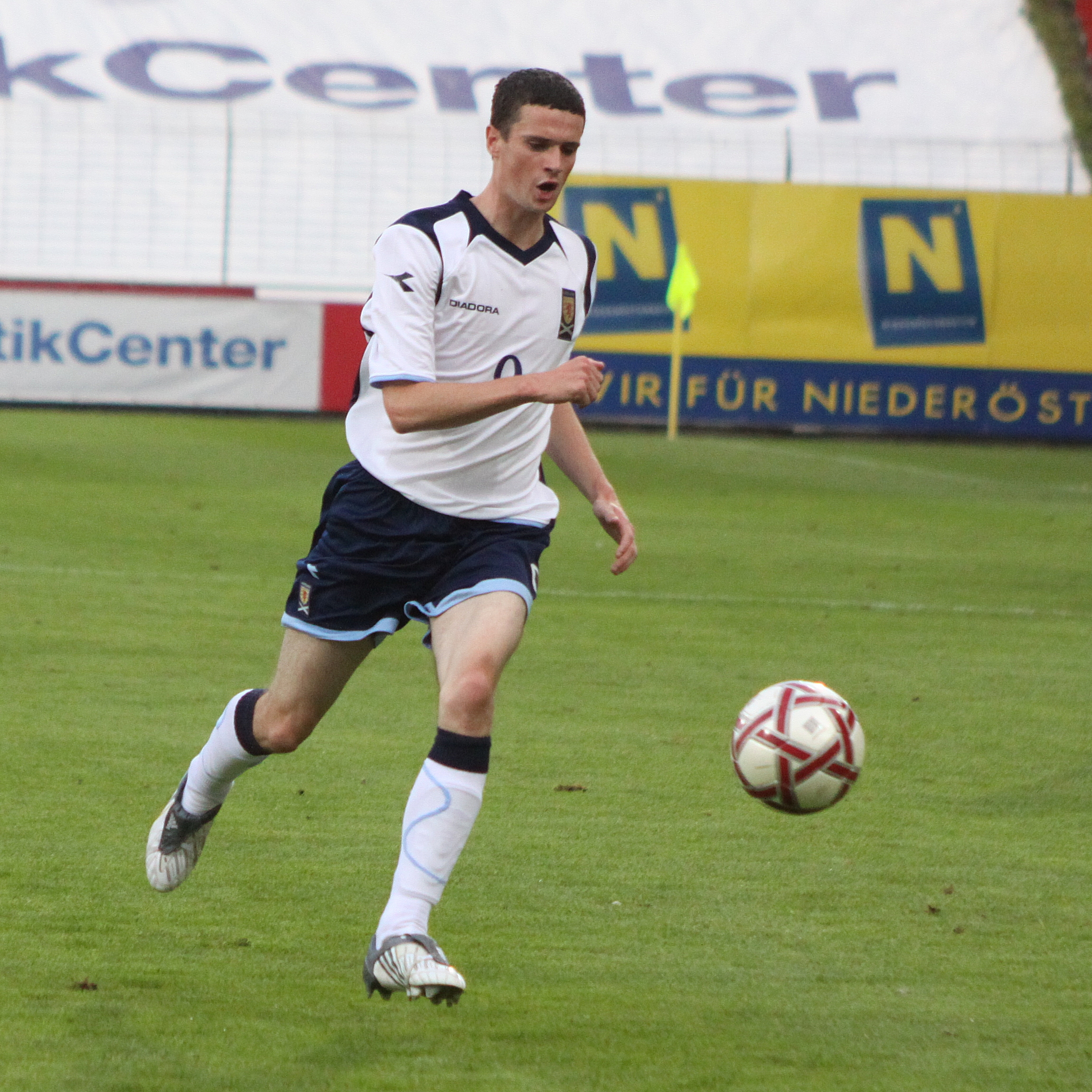 Jamie Murphy (FC Motherwell) - Schottische Fußballnationalmannschaft (U-21-Männer) Jamie Murphy (Motherwell F.C.) - Scotland national under-21 football team — (2)